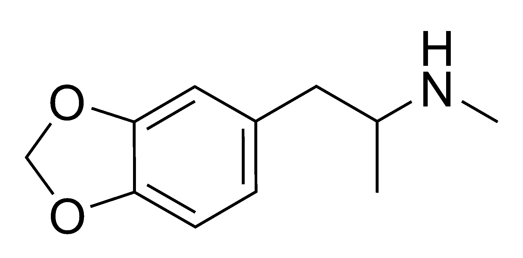 MDMA